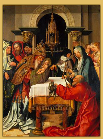 Quer este painel, quer os outros que compunham o retábulo dito de São Bento - a Visitação, a Adoração dos Magos, o Menino Jesus entre os Doutores, todos no Museu Nacional de Arte Antiga, assim como o desaparecido Cristo deposto da Cruz - pertenciam ao conjunto retabular da Capela do Salvador da Igreja do Convento de São Francisco, em Lisboa. Daí transitaram no século XVII para a Capela de Nossa Senhora dos Prazeres do Mosteiro de São Bento da Saúde e, com a extinção das ordens religiosas em 1834, para a Academia Real de Belas Artes, de onde passaram para o Museu Nacional de Arte Antiga. Adriano de Gusmão publicou um documento de 17 de Maio de 1525, descoberto por Vitorino Magalhães Godinho (Torre do Tombo, Corpo Cronológico, Parte II, maço 125, nº 150), de acordo com o qual os pintores de Lisboa Jorge Leal e Gregório Lopes tinham acabado de pintar o retábulo para a Capela do Salvador do Mosteiro de São Francisco, trabalho que iria ser avaliado por Jorge Afonso (pintor régio) e por Antão Leitão (pintor do Senado). Com base neste testemunho, a que se junta, igualmente, o documento encontrado por Reinaldo dos Santos na Torre do Tombo e que pertencia a um Livro de Notas do Mosteiro de São Bento da Saúde (Códice nº 21 do Cartório de São Bento), e um recibo de pagamento a Gregório Lopes datado de 1520 e publicado por Seabra carvalho, pôde-se determinar tanto a autoria/parceria da obra como a sua data de execução.